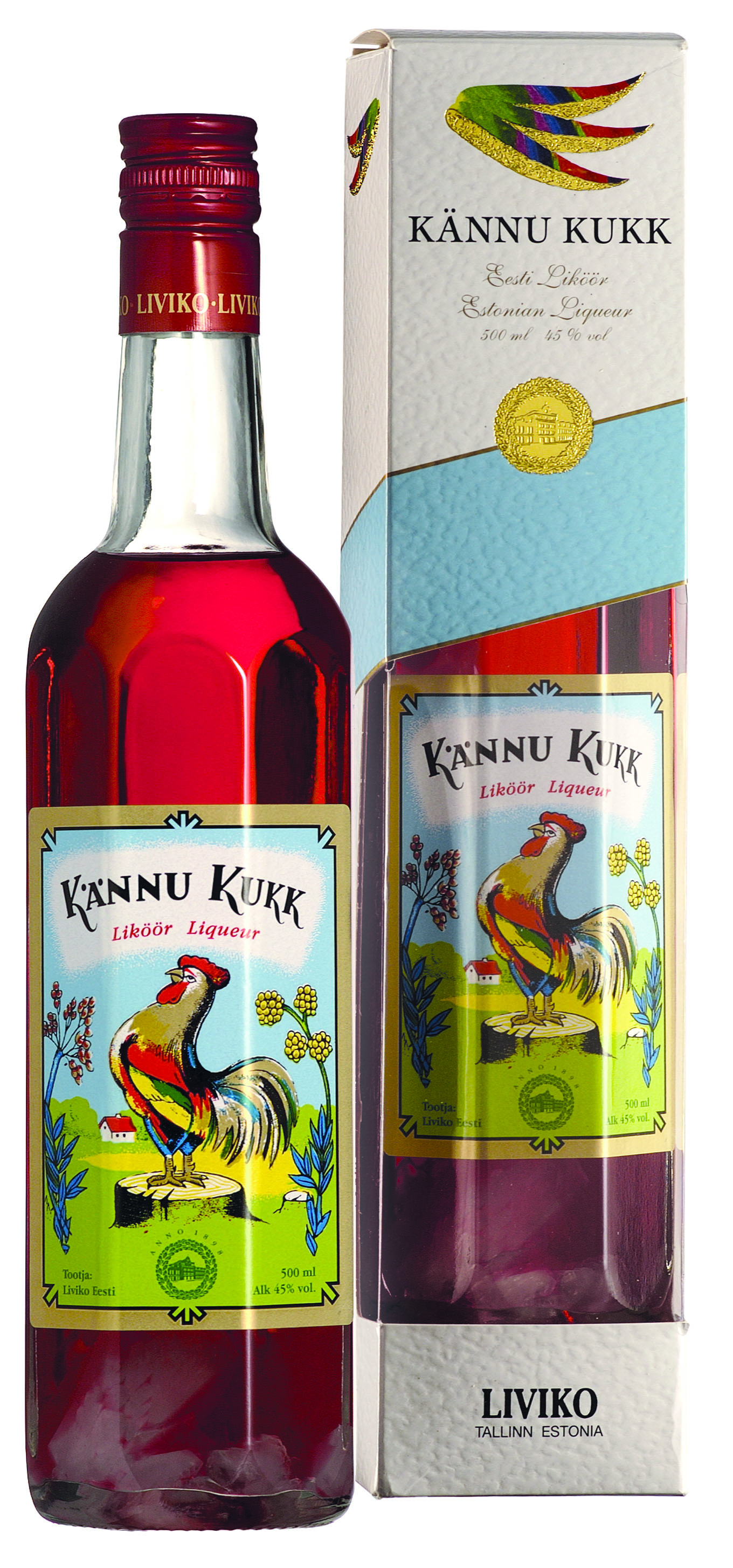 Kannukukk karbis.Tähelepanu! Tegemist on alkoholiga. Alkohol võib kahjustada teie tervist.